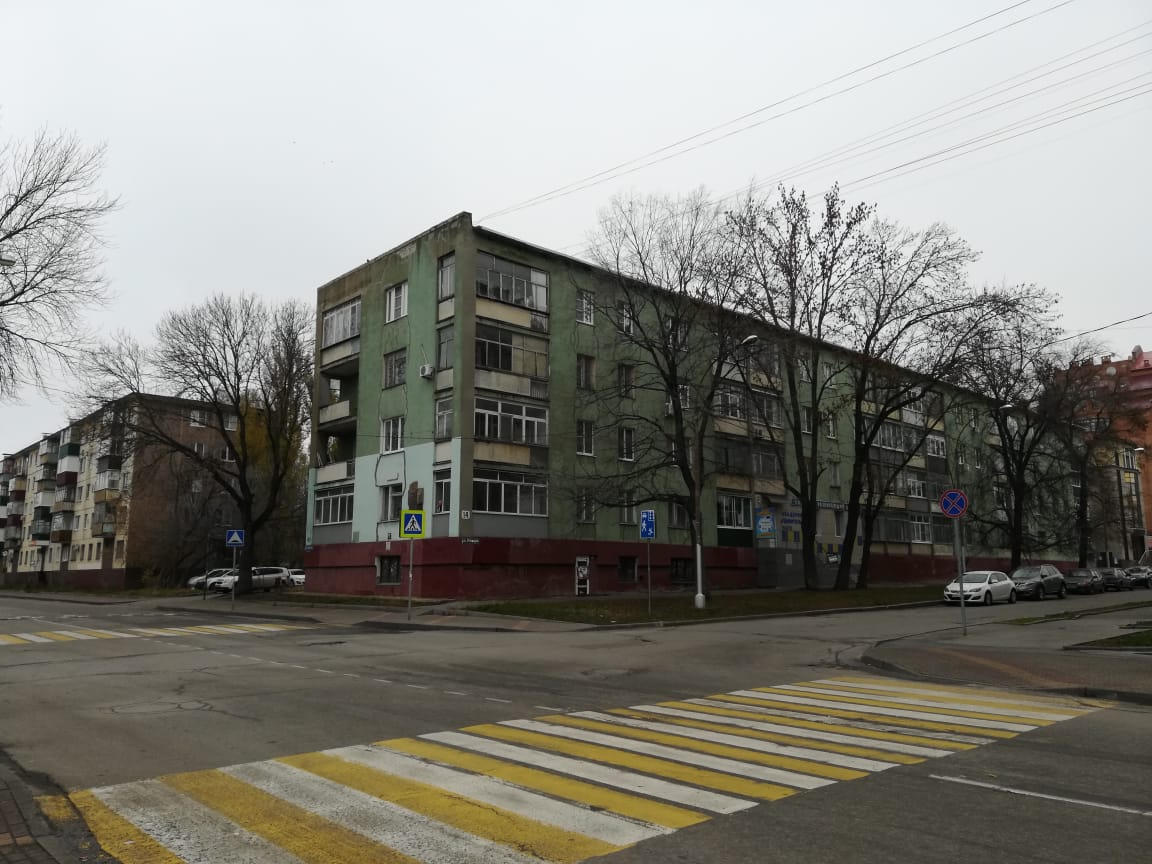 Улица Угловая в Липецке, дом 14, здесь установлена памятная доска Кузьменко Д. Е.